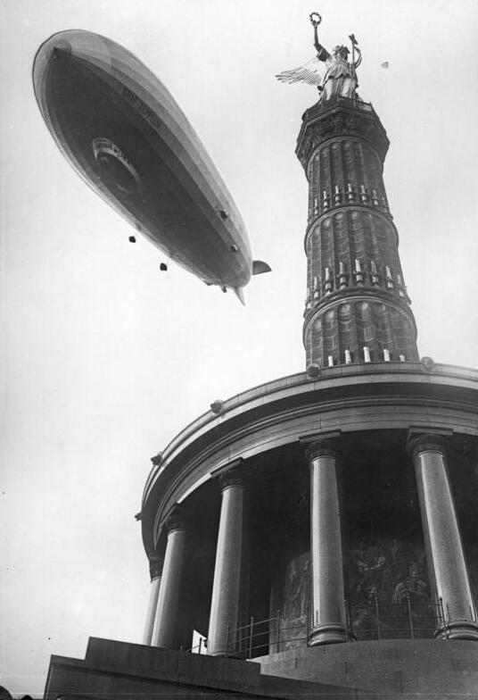 "Graf Zeppelin" über Berlin! "Graf Zeppelin" überfliegt die Siegessäule in Berlin.